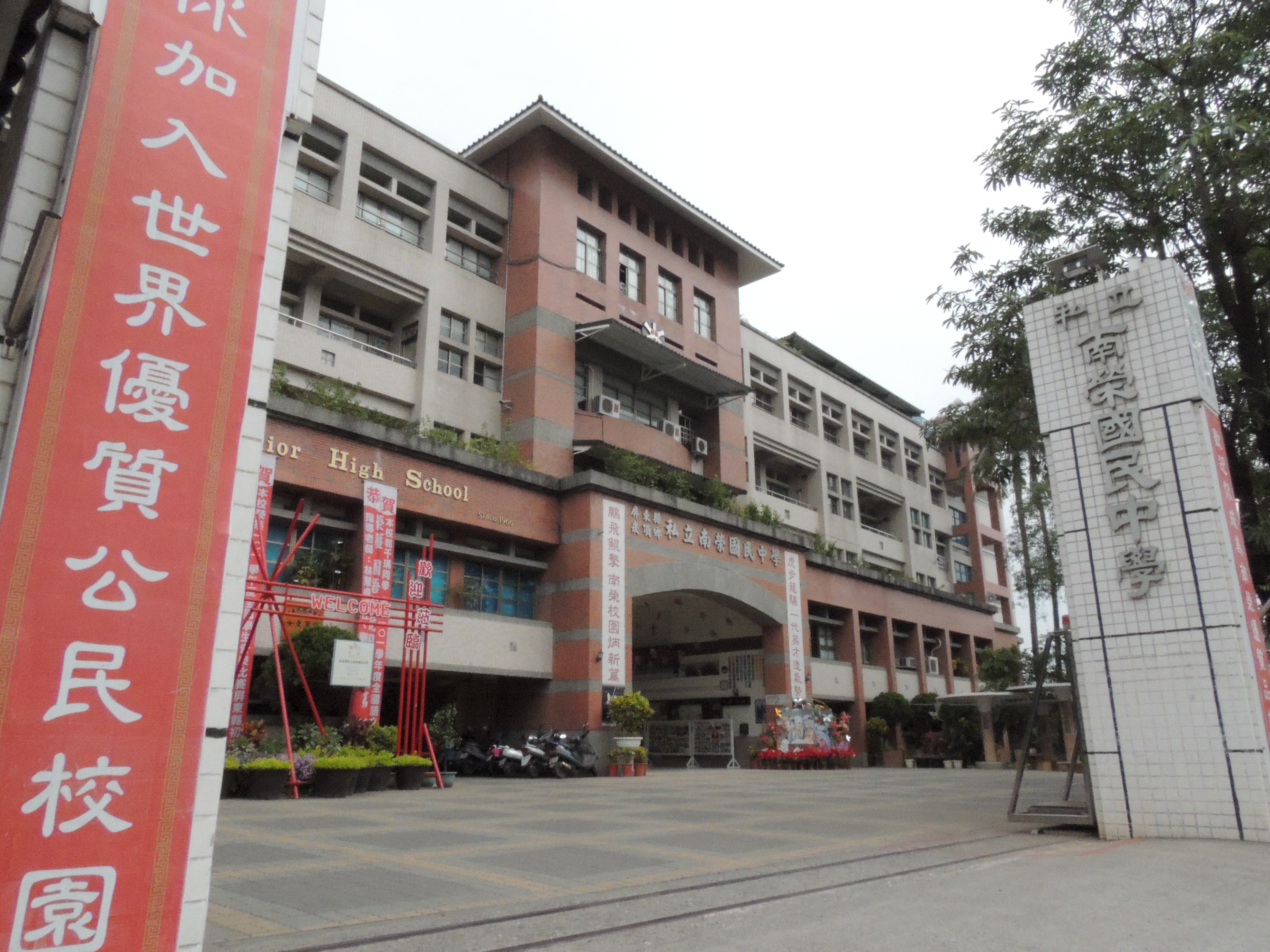 中文（台灣）: 屏東縣私立南榮國中